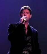 01.07.1964g.